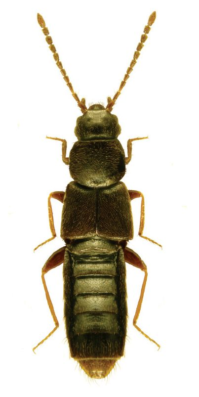 Schistoglossa carexiana